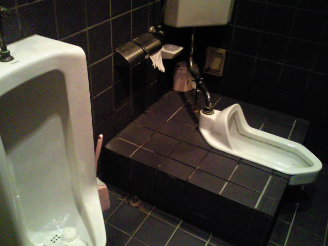 C750AVとC307